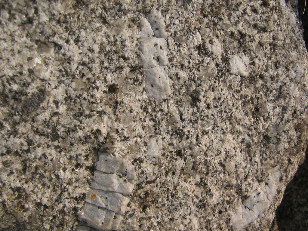 Granite porphyroïde de la Margeride (Massif central, France)